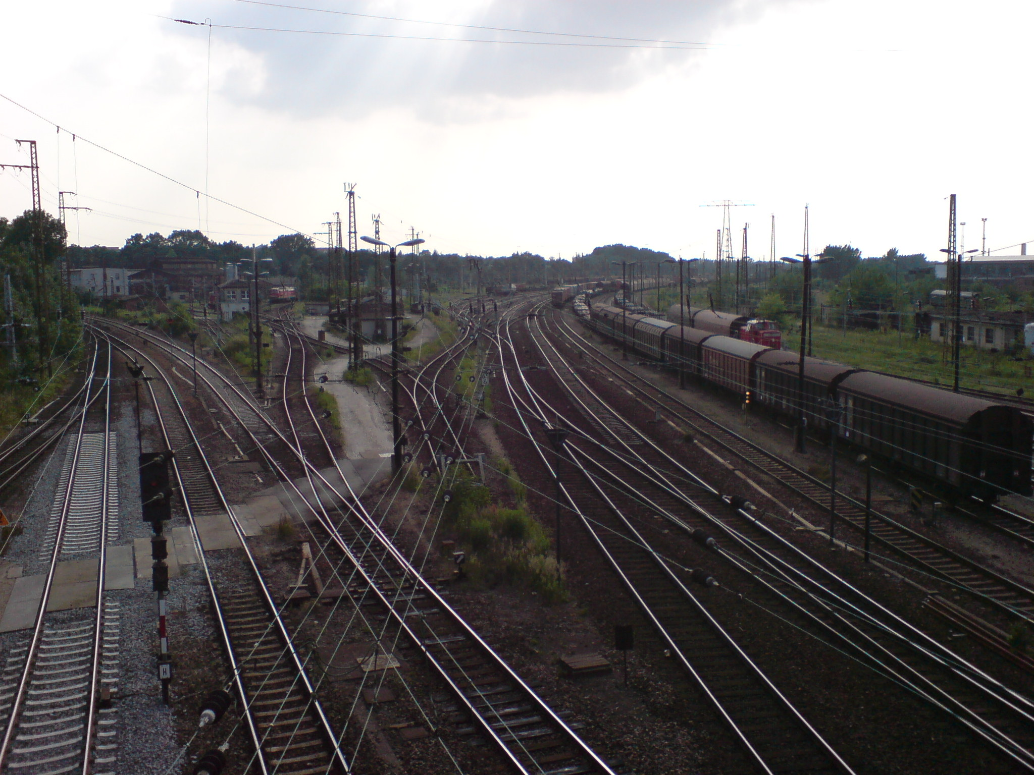 Bahnhof Riesa. Abzweig und Beginn der KBS 520 nach Chemnitz. Rechts die Gleise nach Leipzig (KBS 500)